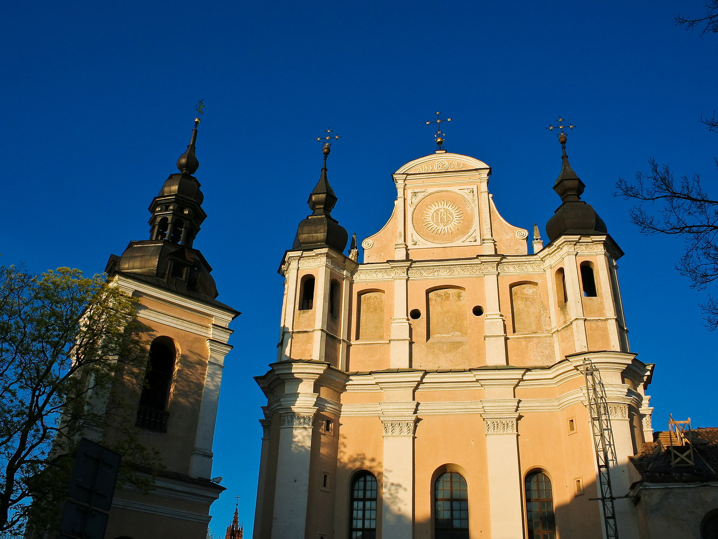 St. Michael's Church in Vilnius